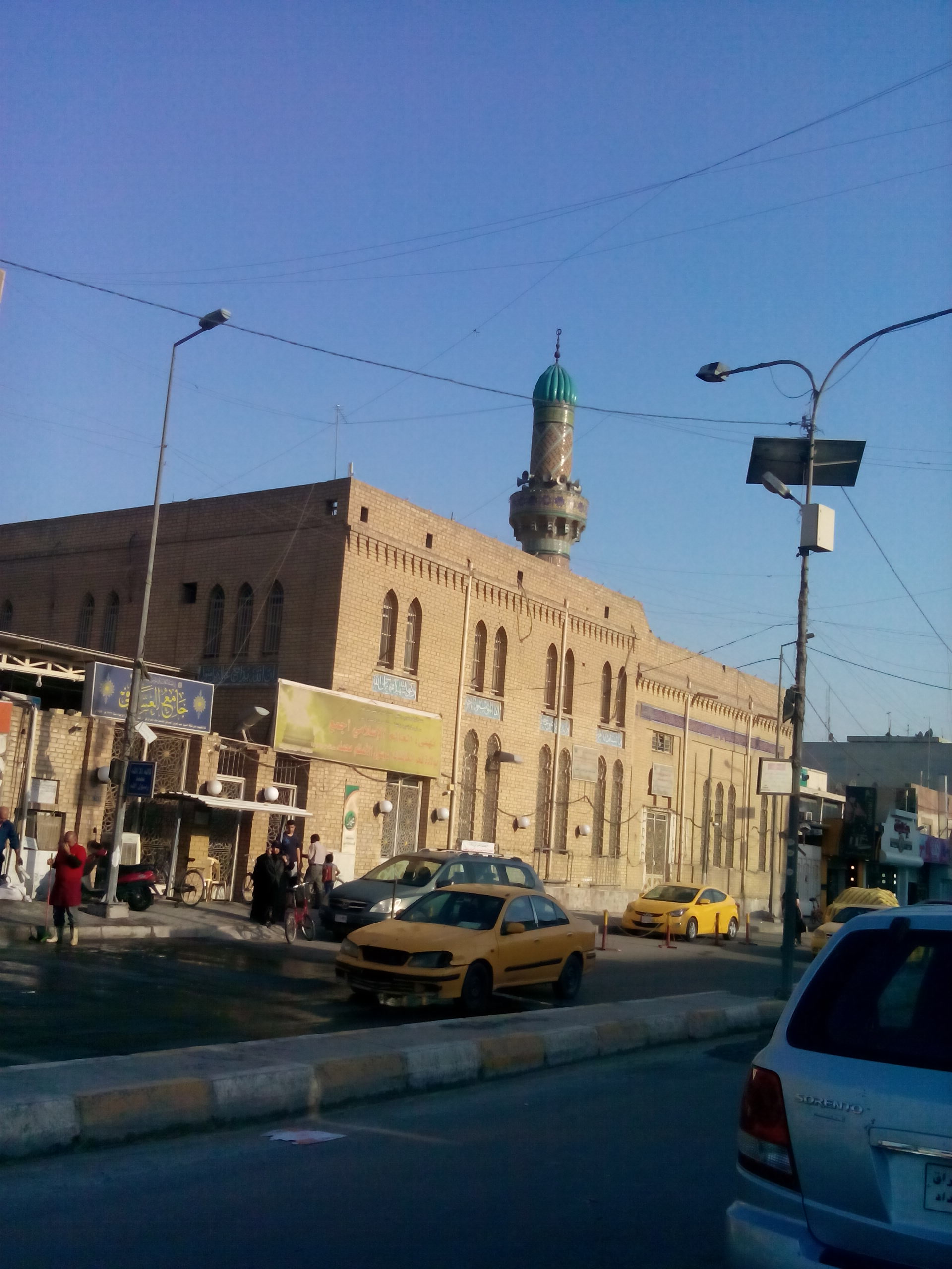 جامع العسافي في بغداد ويقع في شارع الضباط بمنطقة الأعظمية وهو من مساجد بغداد القديمة التي بنيت في عهد المملكة العراقية عام 1956.